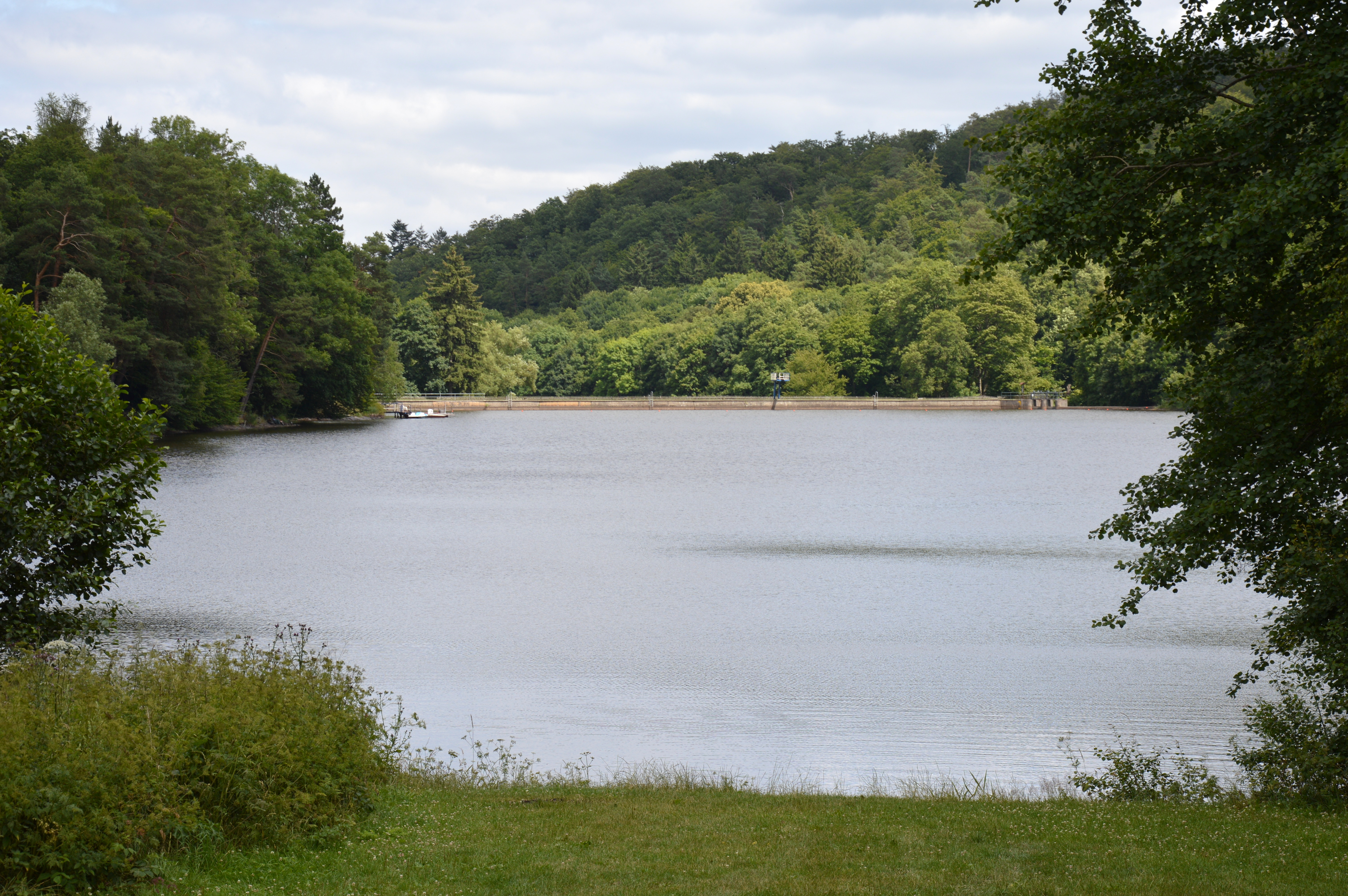 Bergsee bei Güntersberge